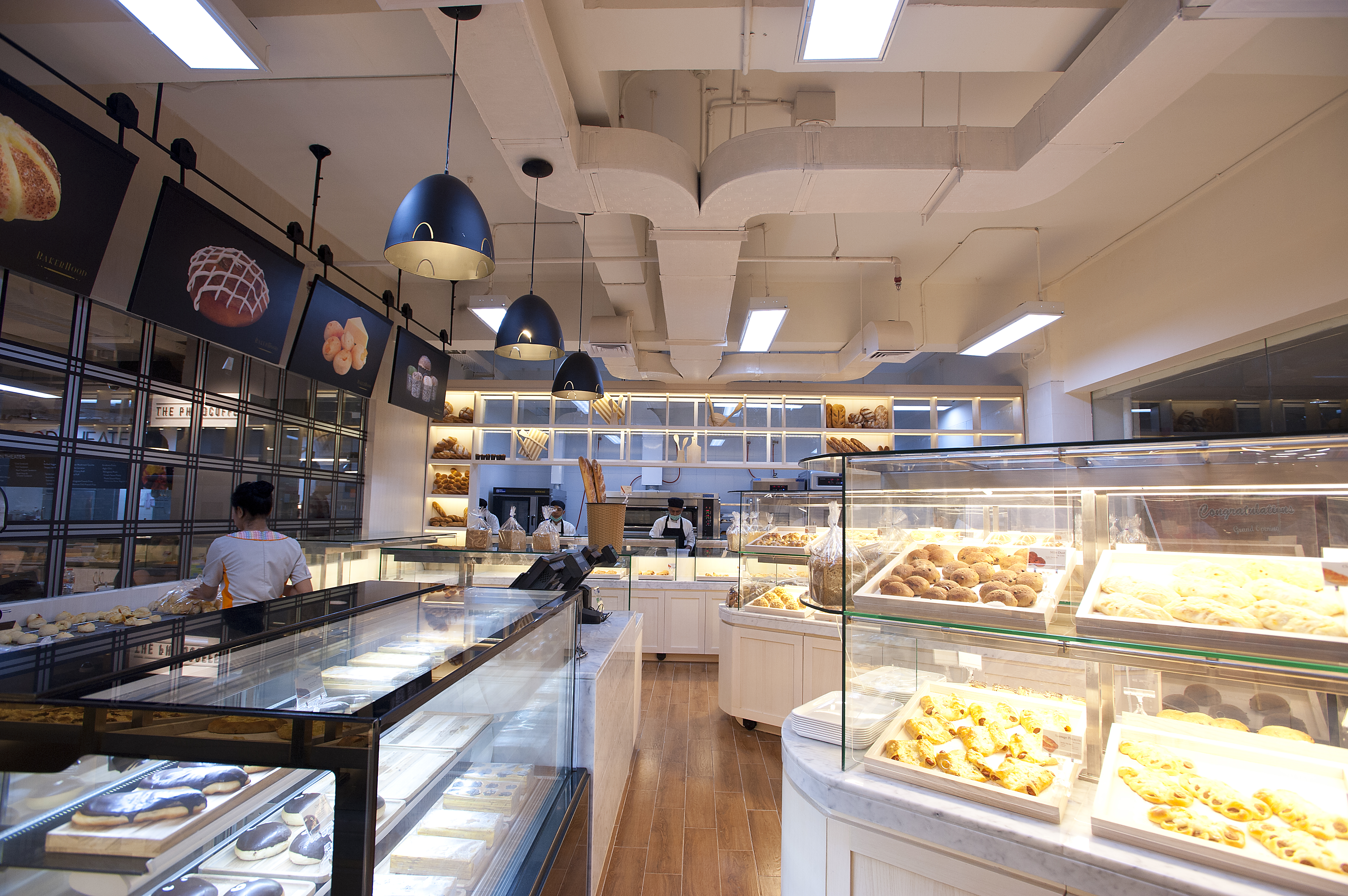 BakerHood